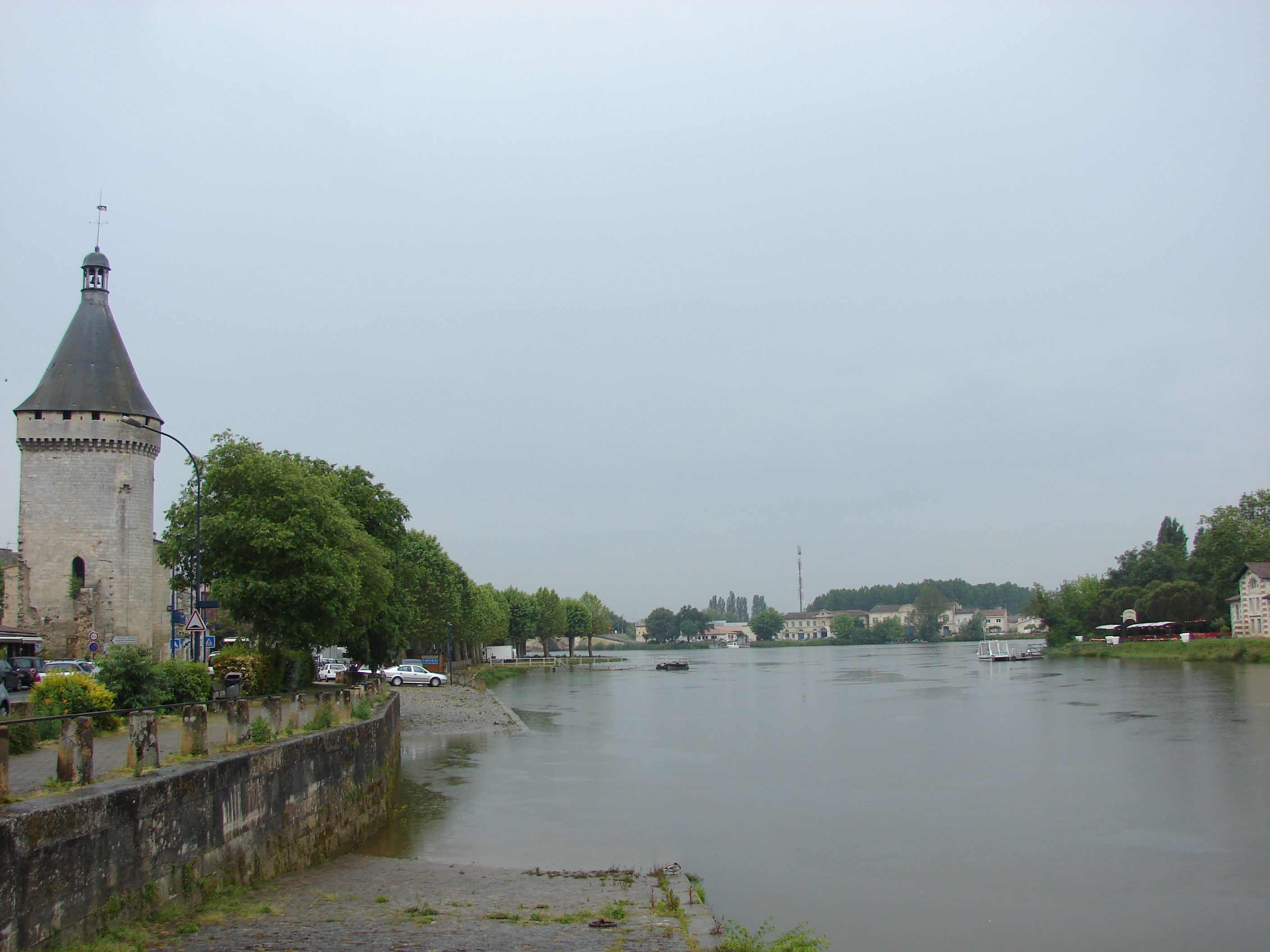 Tour du Gr Port; L`Isle, Libourne, Aquitaine, France